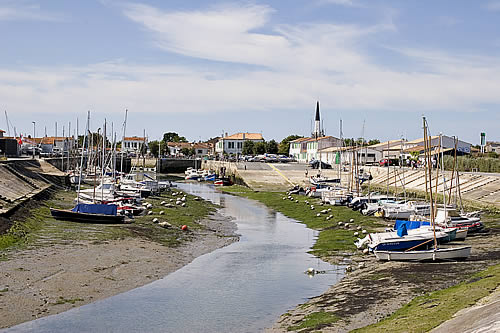 Le port d'Ars-en-Ré, arrivée au bassin. Photo de ma banque d'images personnelle